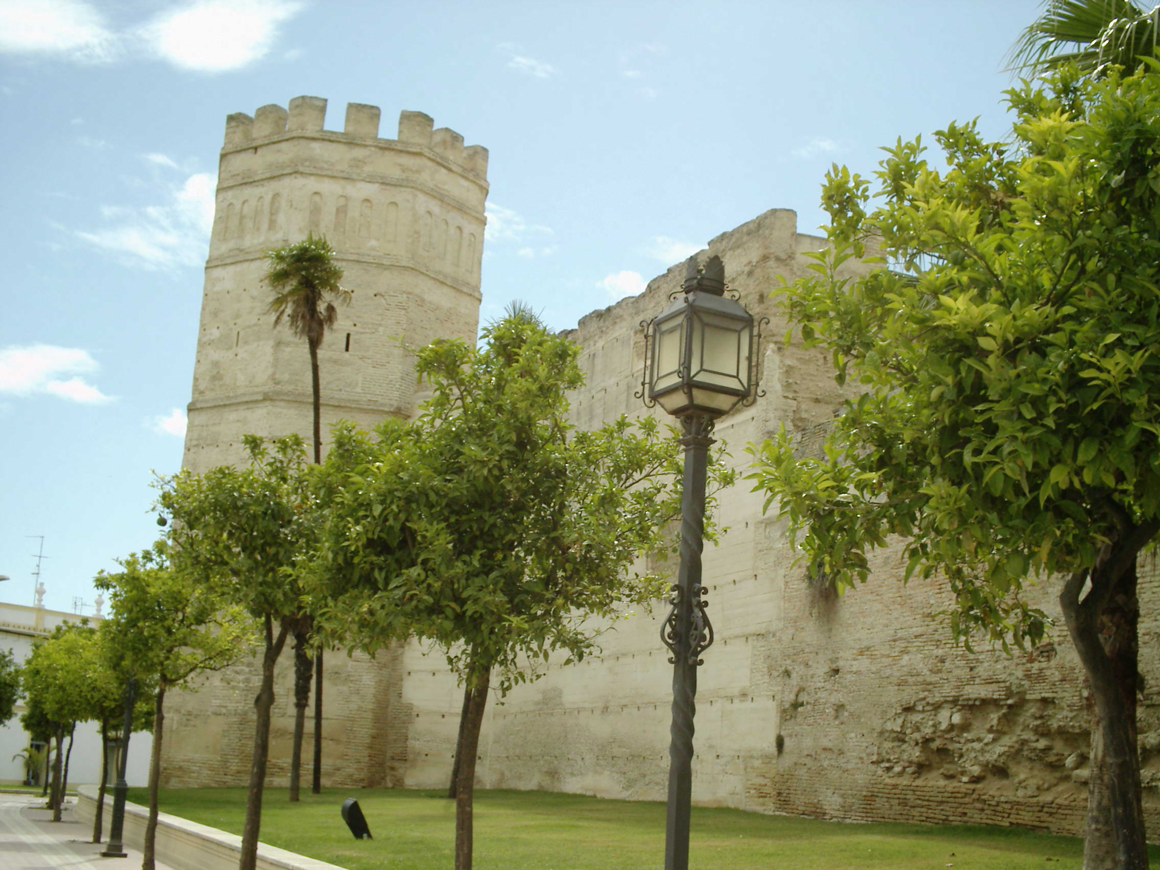 Vista exterior de la muralla del Alcázar de Jerez de la Frontera (Cádiz - España) Vue extérieure de la muraille de l'Alcázar de Jerez de la Frontera (Cadix - Espagne)